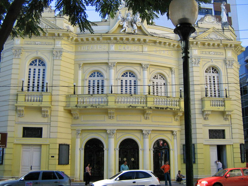 Teatro Carlos Gomes (Carlos Gomes Theatre), Vitória, state of Espírito Santo, Brazil.